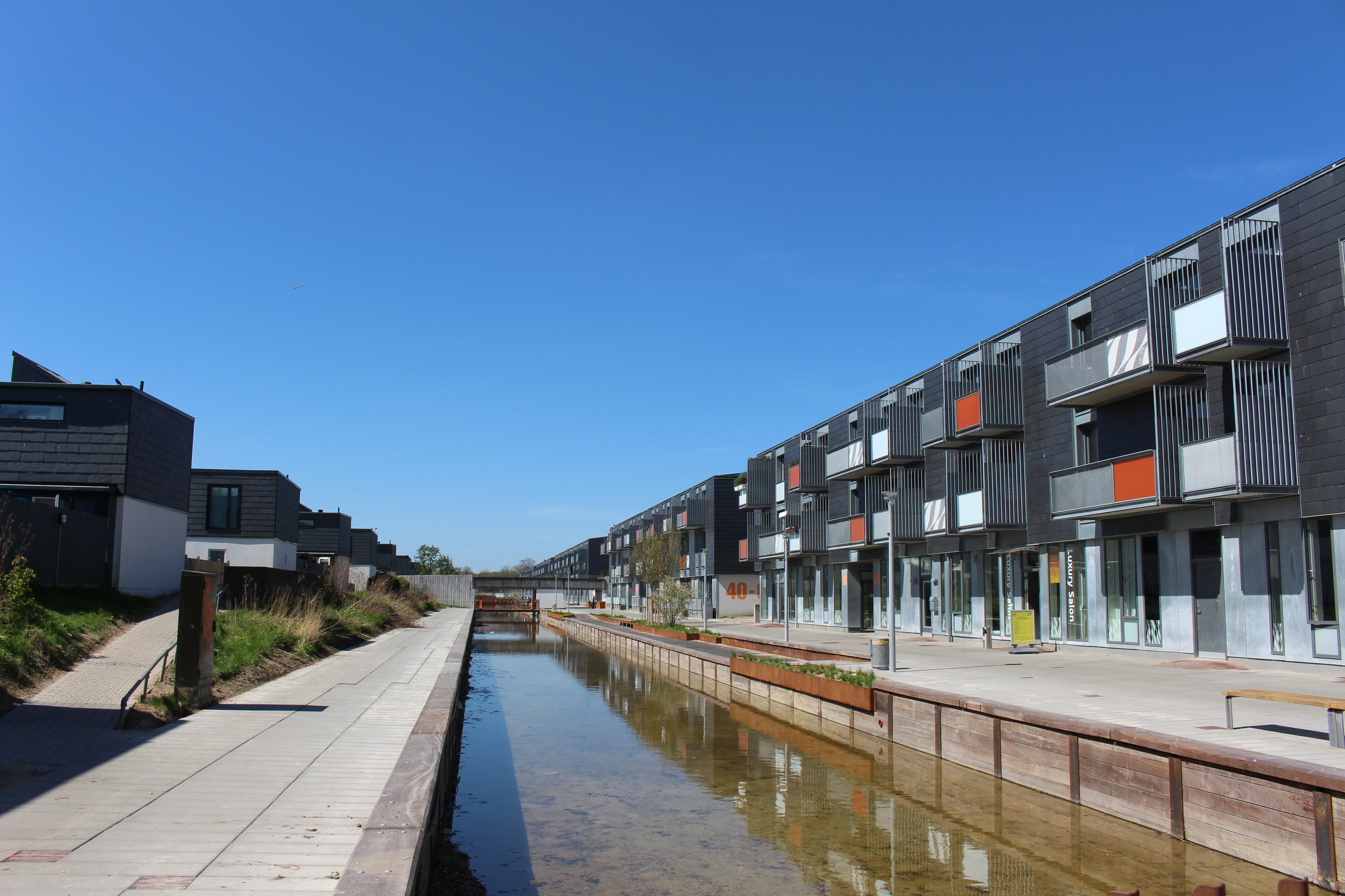 Kanalen i Albertslund Syd